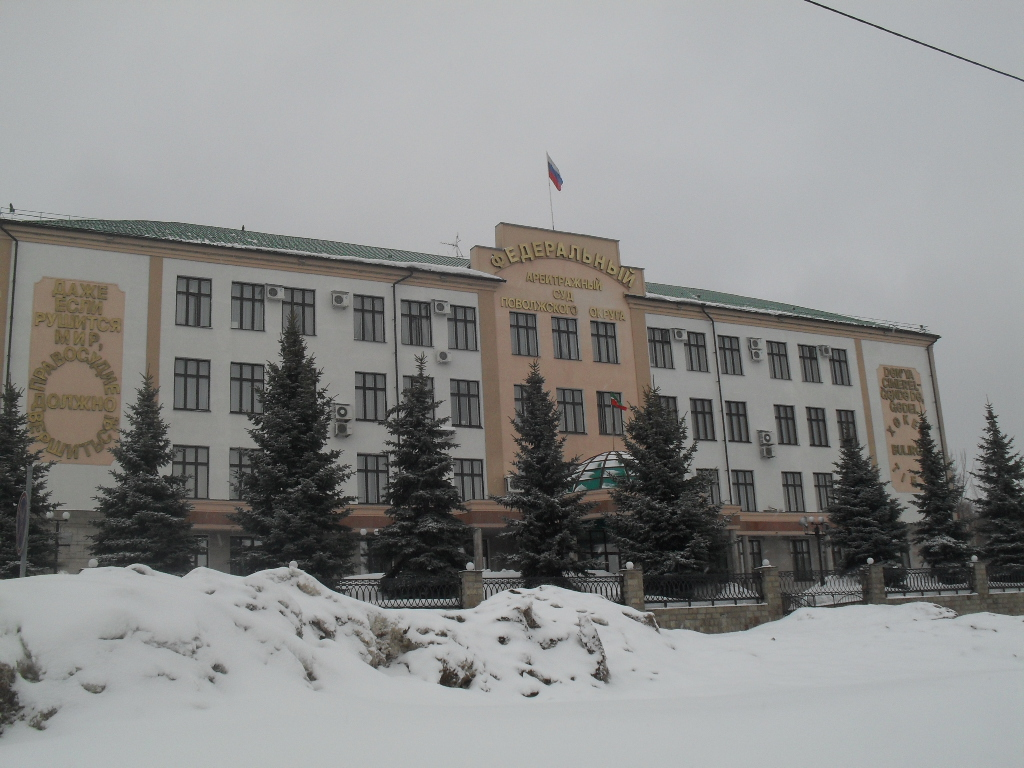 Здание Федерального арбитражного суда Поволжского округа